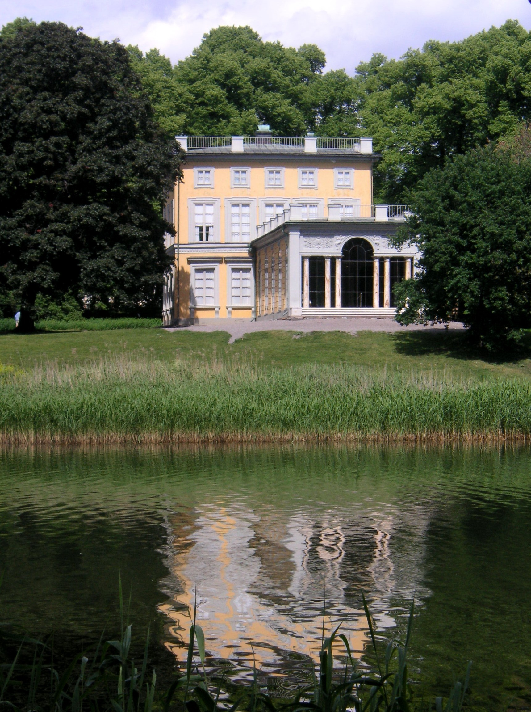 Gustav III:s Paviljong i Hagaparken